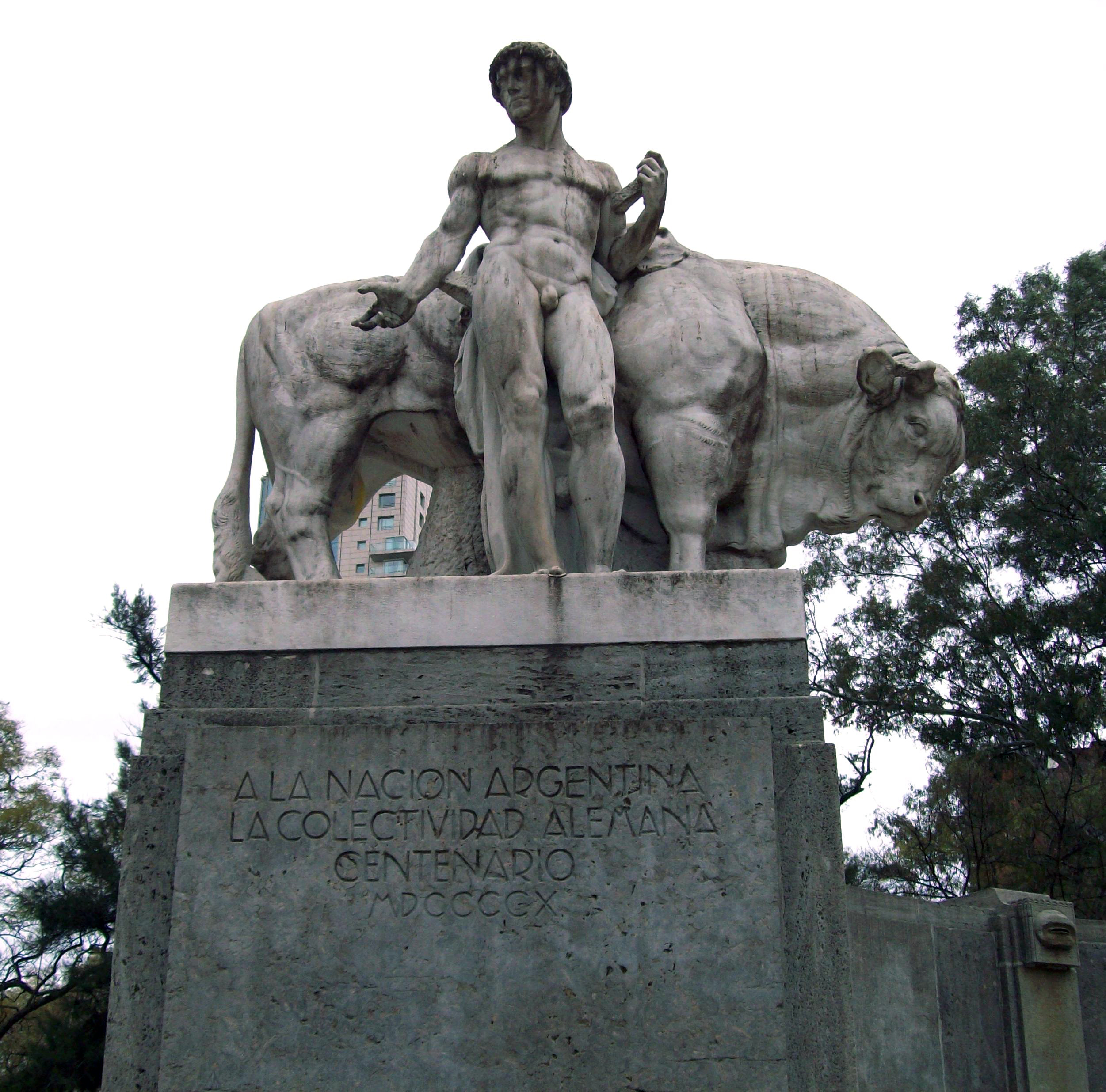 Fuente Riqueza Agropecuaria Argentina, detalle escultura izquierda.